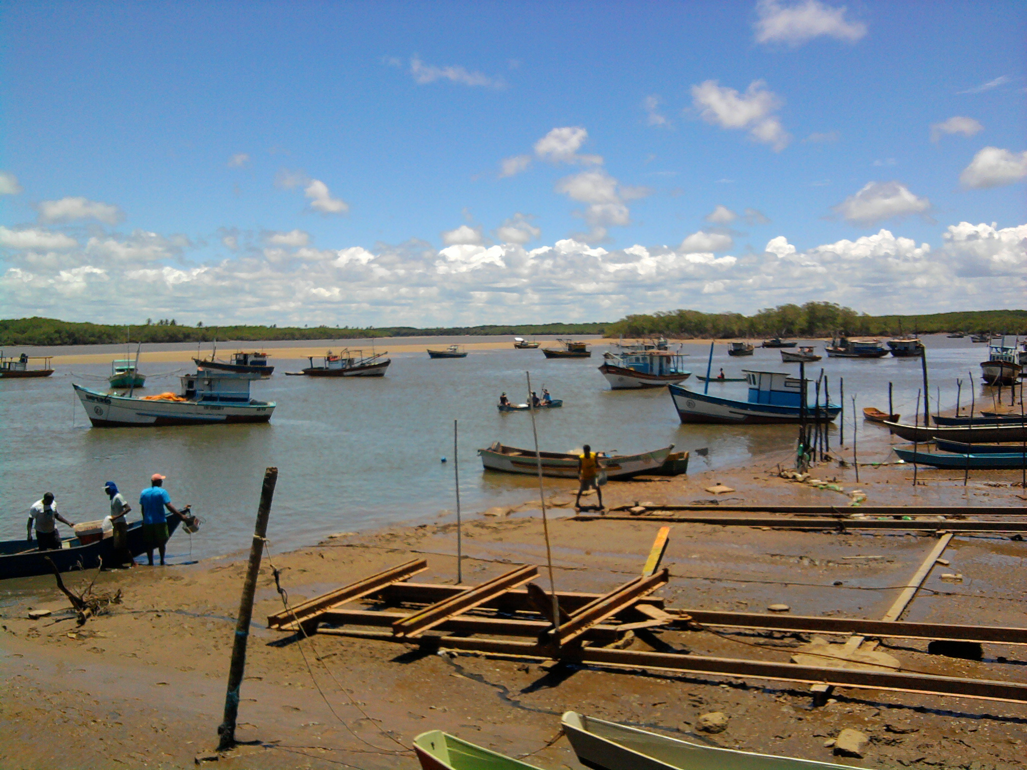 Pescadores no Rio Cricaré